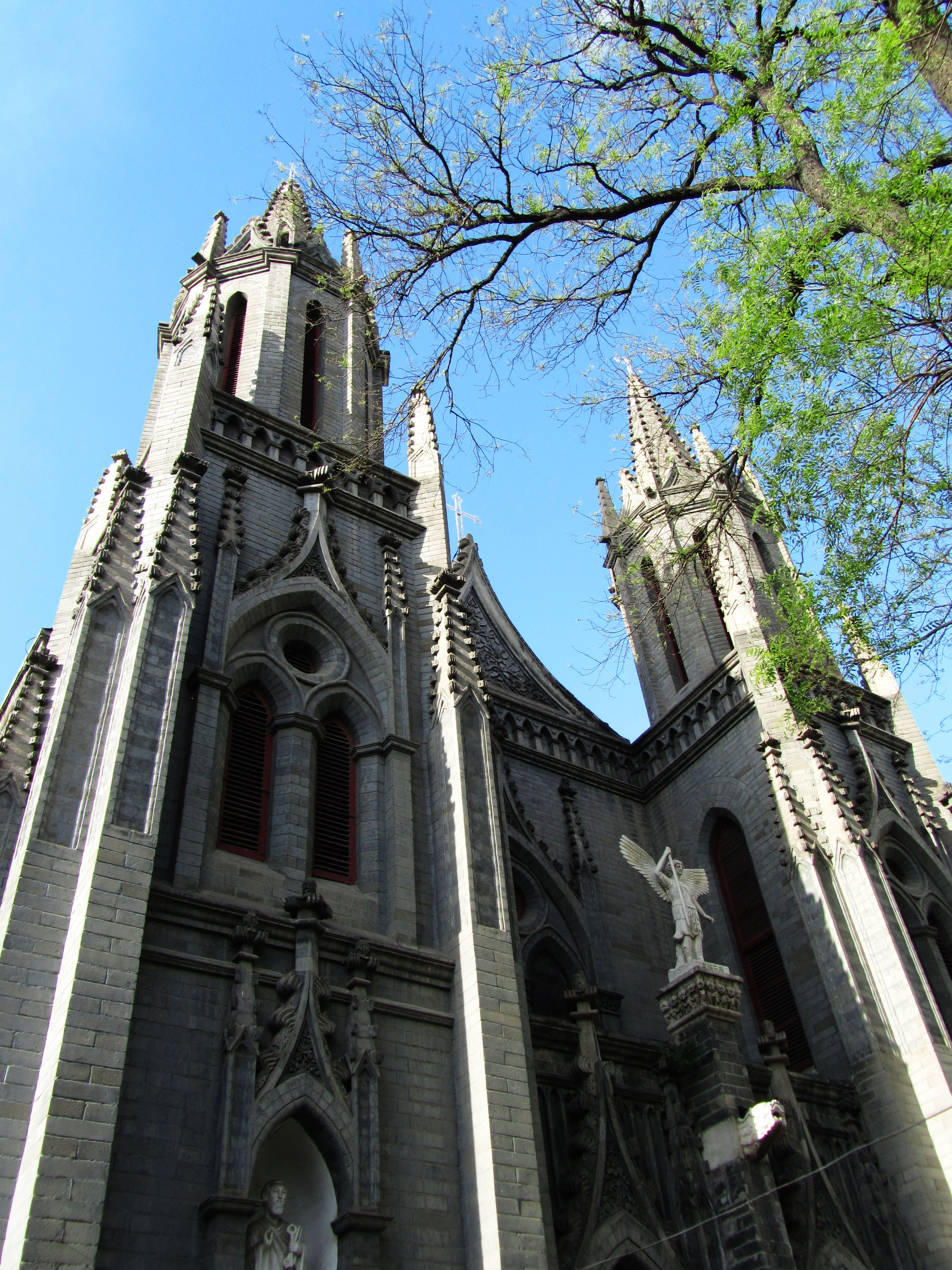 北京东交民巷天主堂（圣米厄尔教堂），南面仰视。